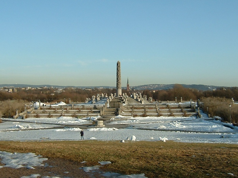 Oslo - Vigeland Park, overview of the monolith terrace - own photo, March 2003. Gustav Vigeland, the sculptor, died 12 March 1943.